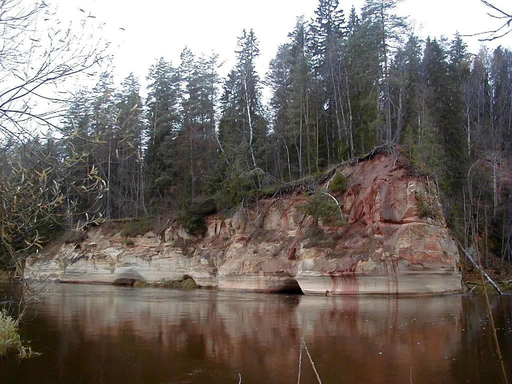 Gūdu klintis pie Gaujas. 2004-10-30